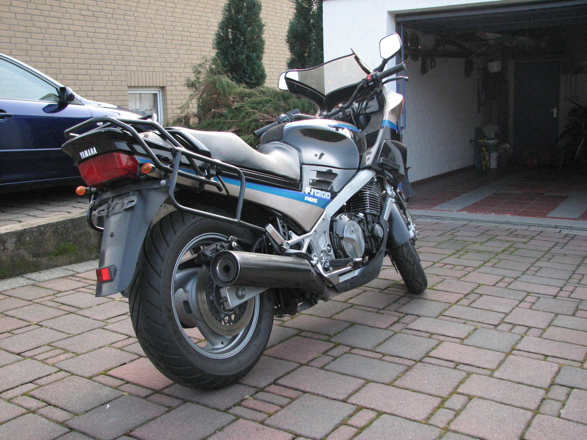 FJ 1200 Typ: 3YA selbst fotografiert